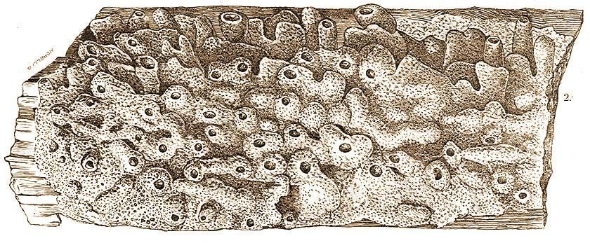 Eunapius carteri balatonensis